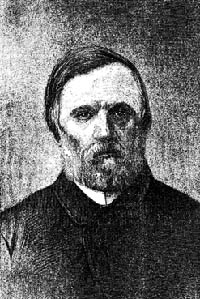 Franciszek Henryk Duchiński